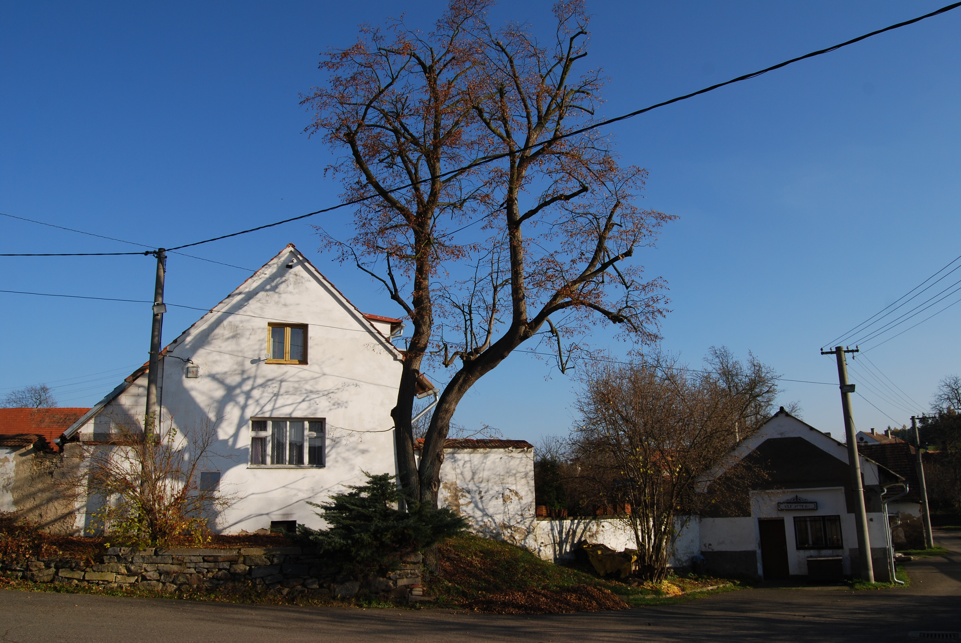 Pohled na část návsi. Vlkonice je část obce Křečovice v okrese Benešov. Česká republika.